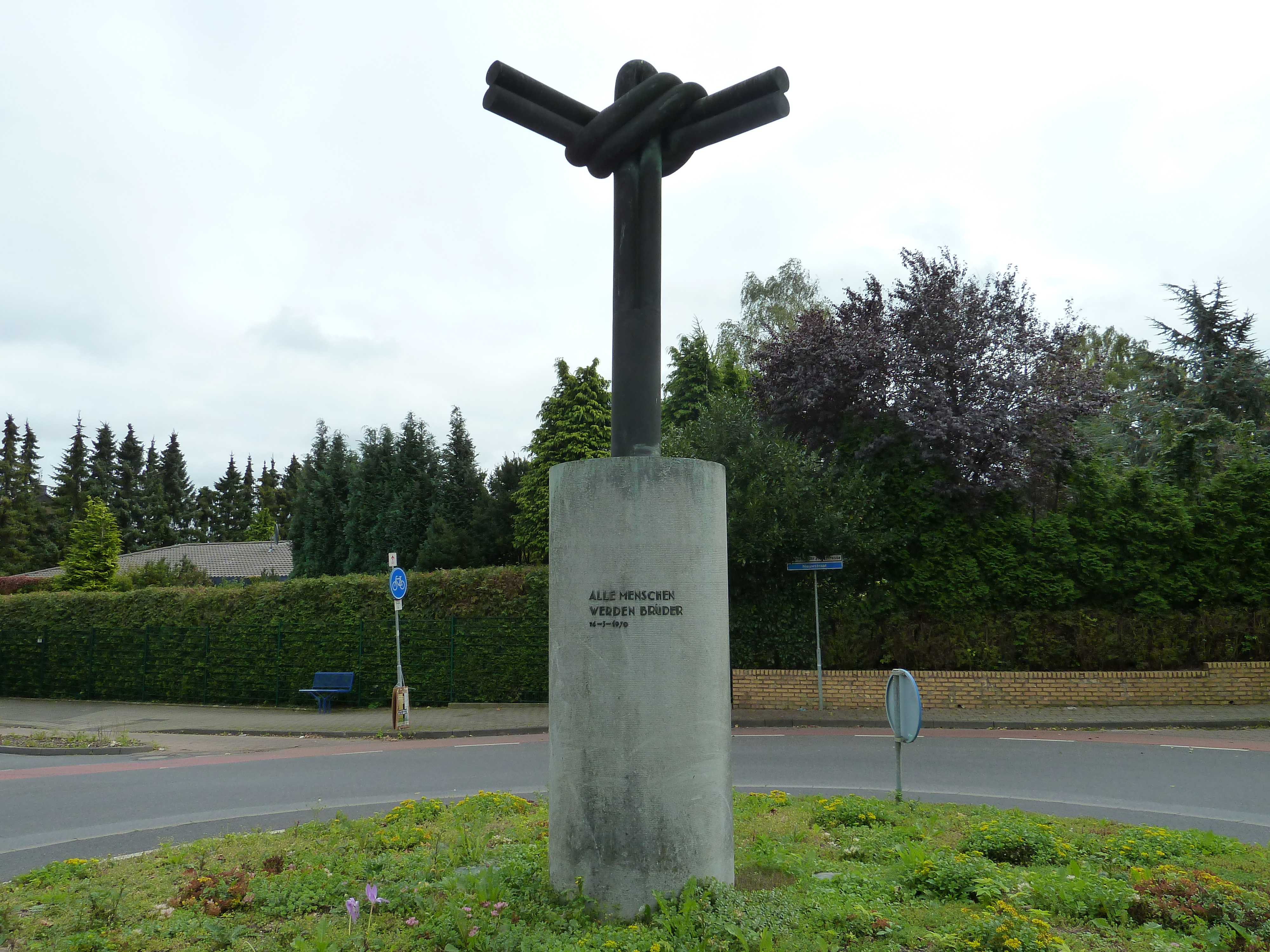 "Alle Menschen werden Brüder" Denkmal in der Neustraße, Nieuwstraat